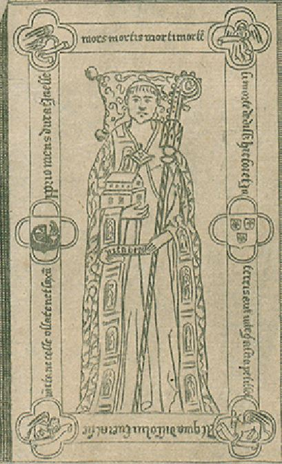 Deckplatte des Sarkophags von Abt Lubert Hautscilt (1347-1417), Darstellung als Stifter, Symbole der Evangelisten in den Ecken, Familien-Wappen; Kloster St. Bartholomäus in Eeckhout bei Brügge, um 1420, Abbildung auf einem Stich von 1671